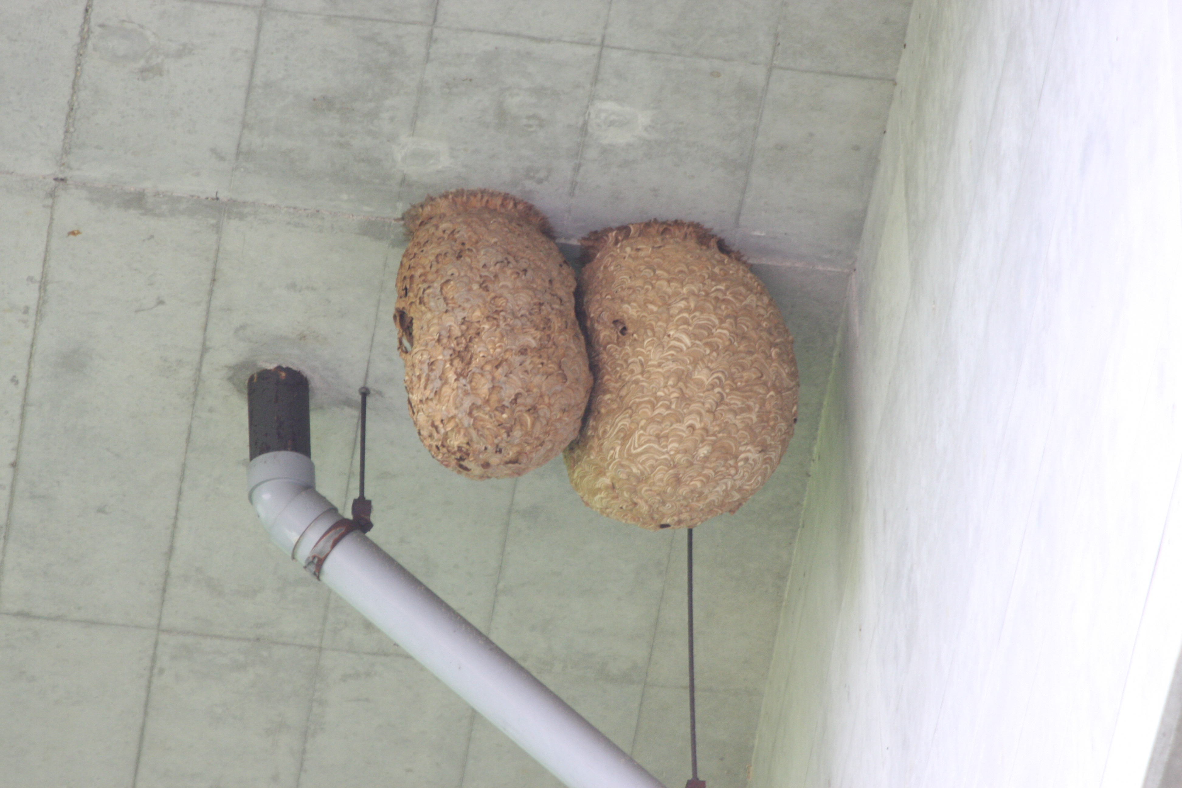 スズメハチの巣